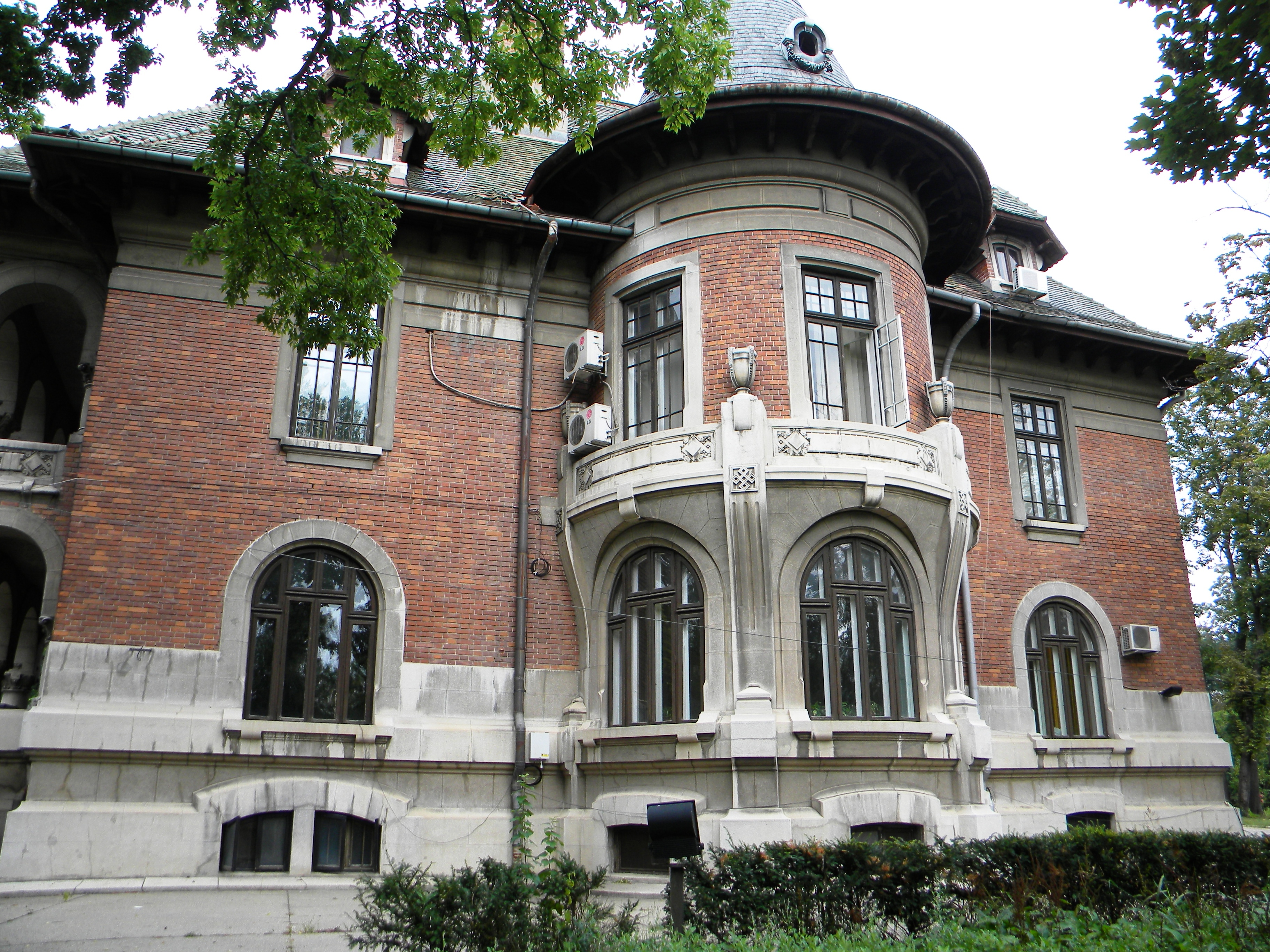 Bucuresti, Romania, Aleea Modrogan nr. 1 (Vila); B-II-m-B-19227 (4)